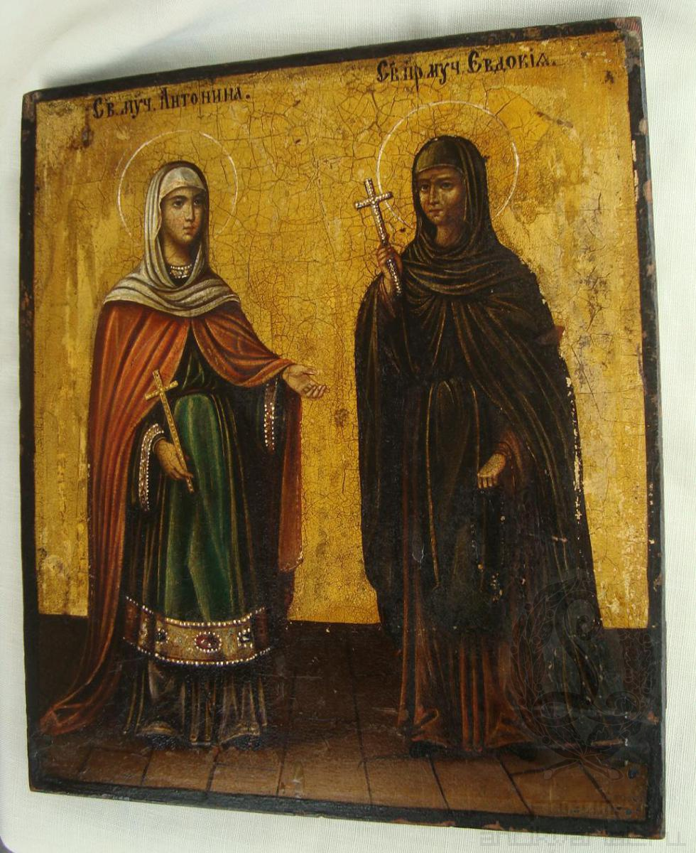 Икона Святой Антонины и Святой Евдокии. Афон. На золоте. 19 век. На обратной стороне печать и надпись: "Сия икона мученицы Евдокии и мученицы Антонины. Написана и освящена на Афонской горе в русском общежительном скиту Святого Андрея Первозванного". Размер: 31 на 27 см.